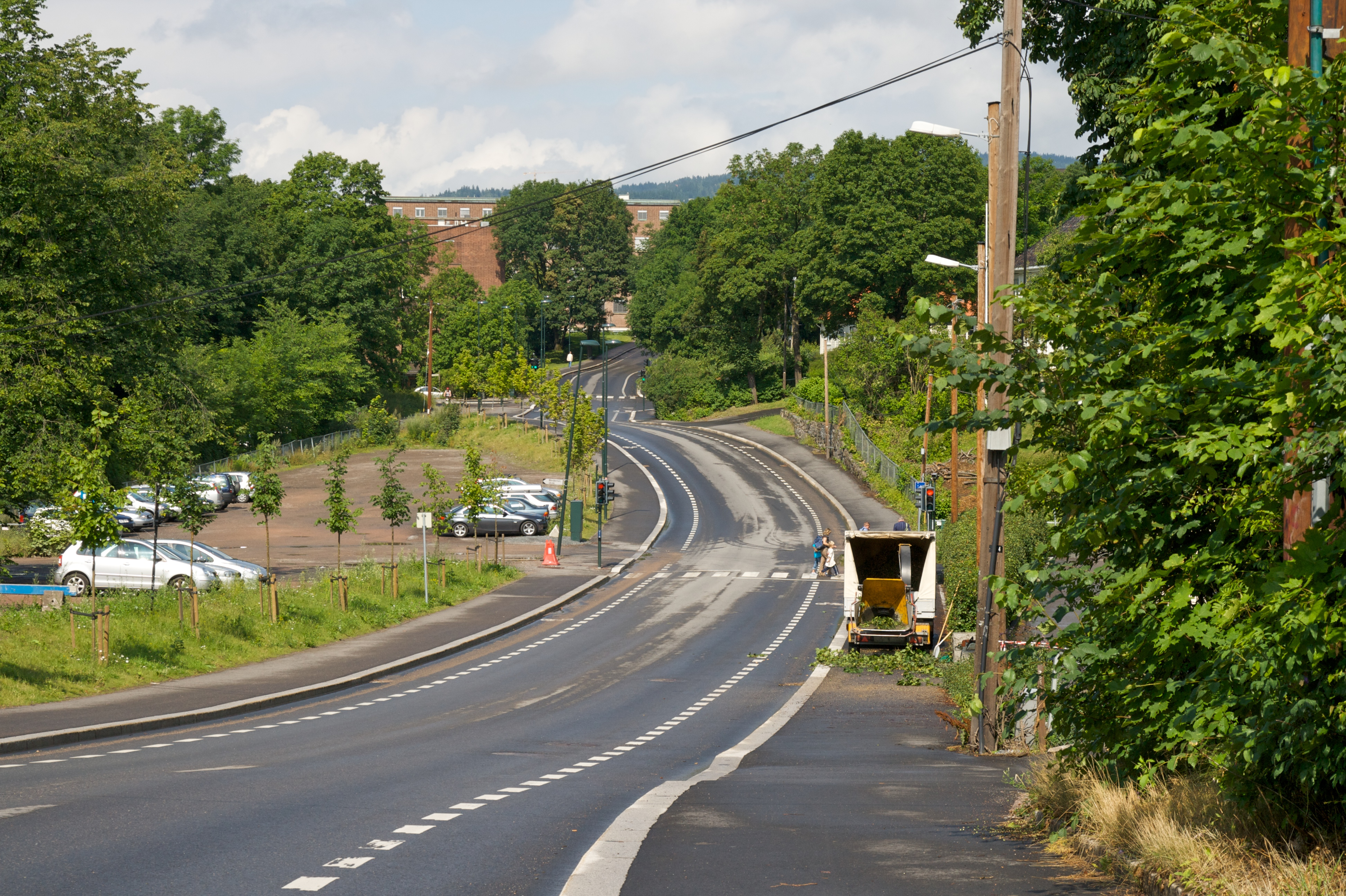 Blindernveien, Oslo.